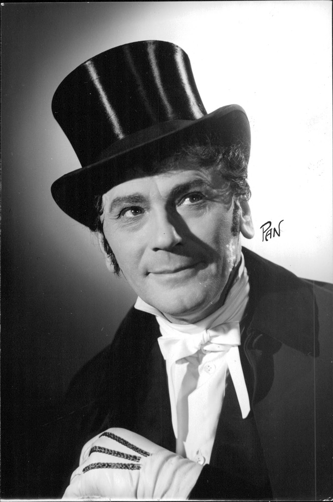 Edvin Adolphson i Tolvskillingsoperan på Intima Teatern 1950.